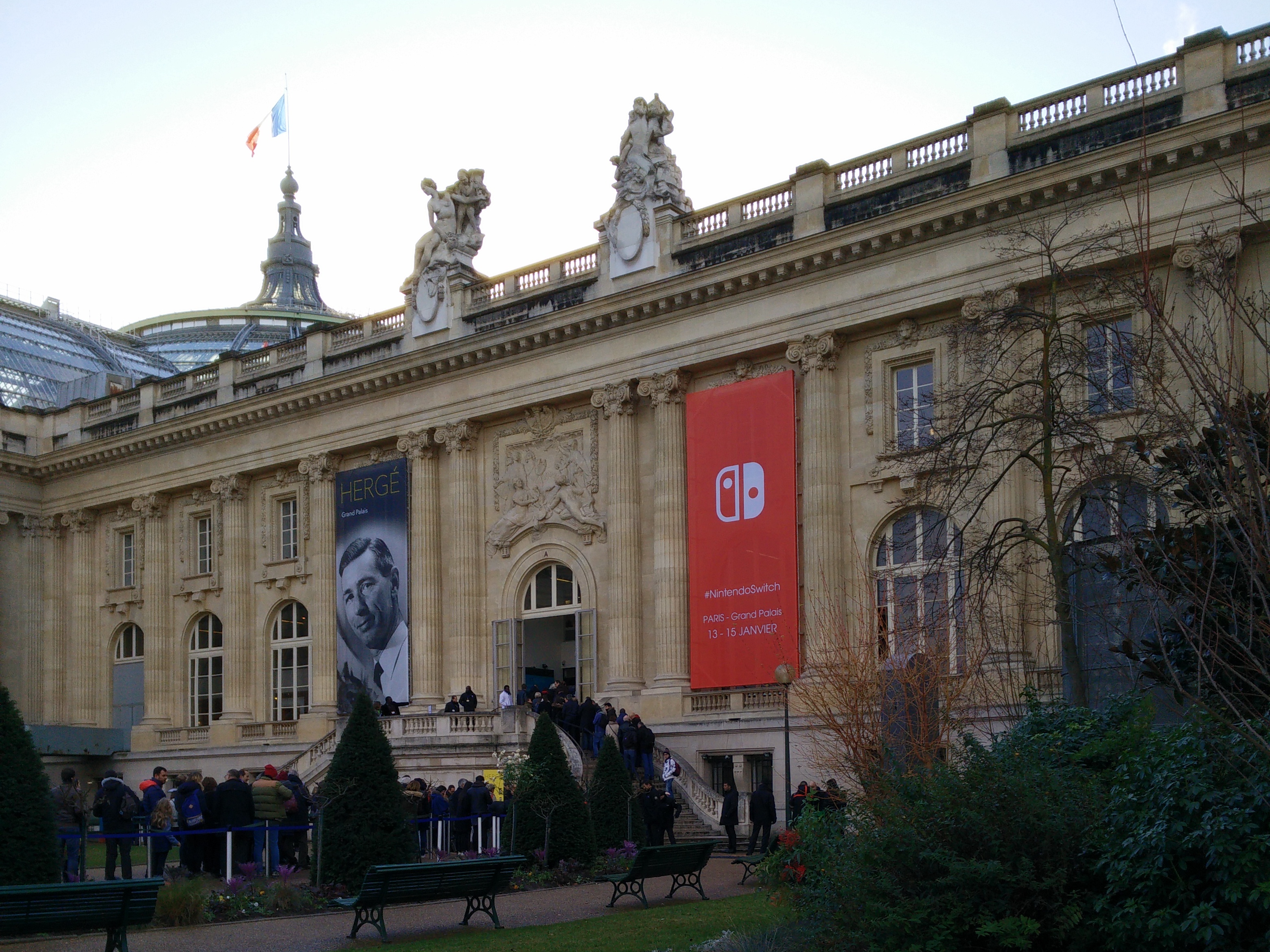 Façade du Grand Palais, côté Nintendo Switch, qui a accueilli l’événement de présentation de la Nintendo Switch à Paris le 14 et le 15 Janvier 2017